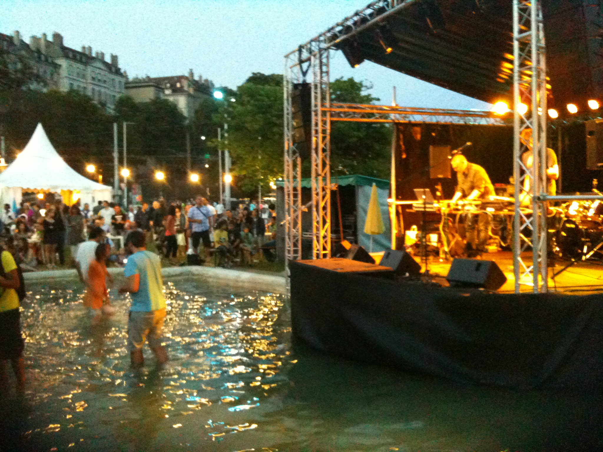 Fête de la musique à Genève